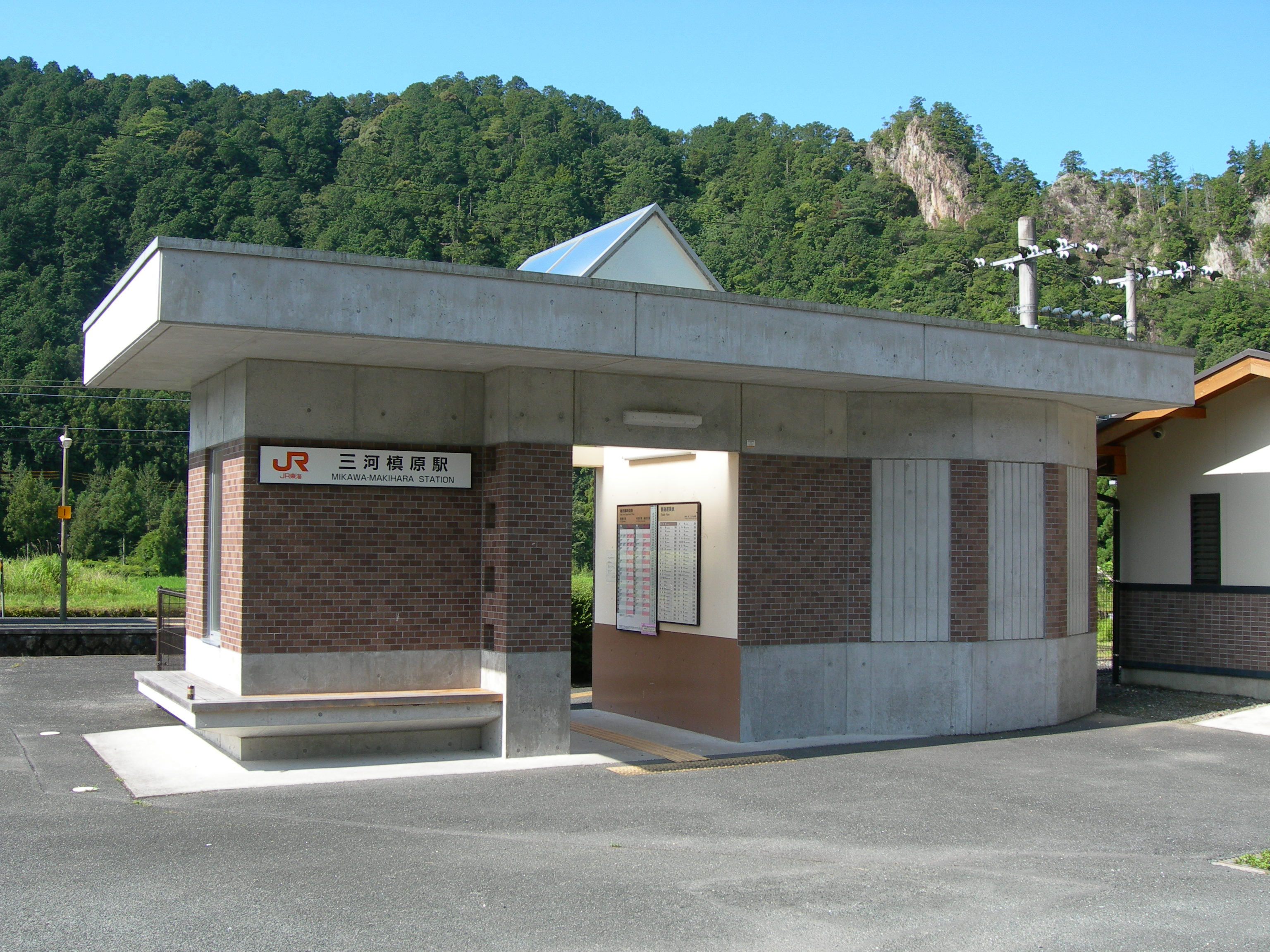 三河槙原駅